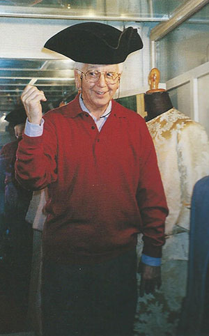 (Cadeo Novembre 1922-Albenga Novembre 1997) fondatore dell’omonima sartoria teatrale